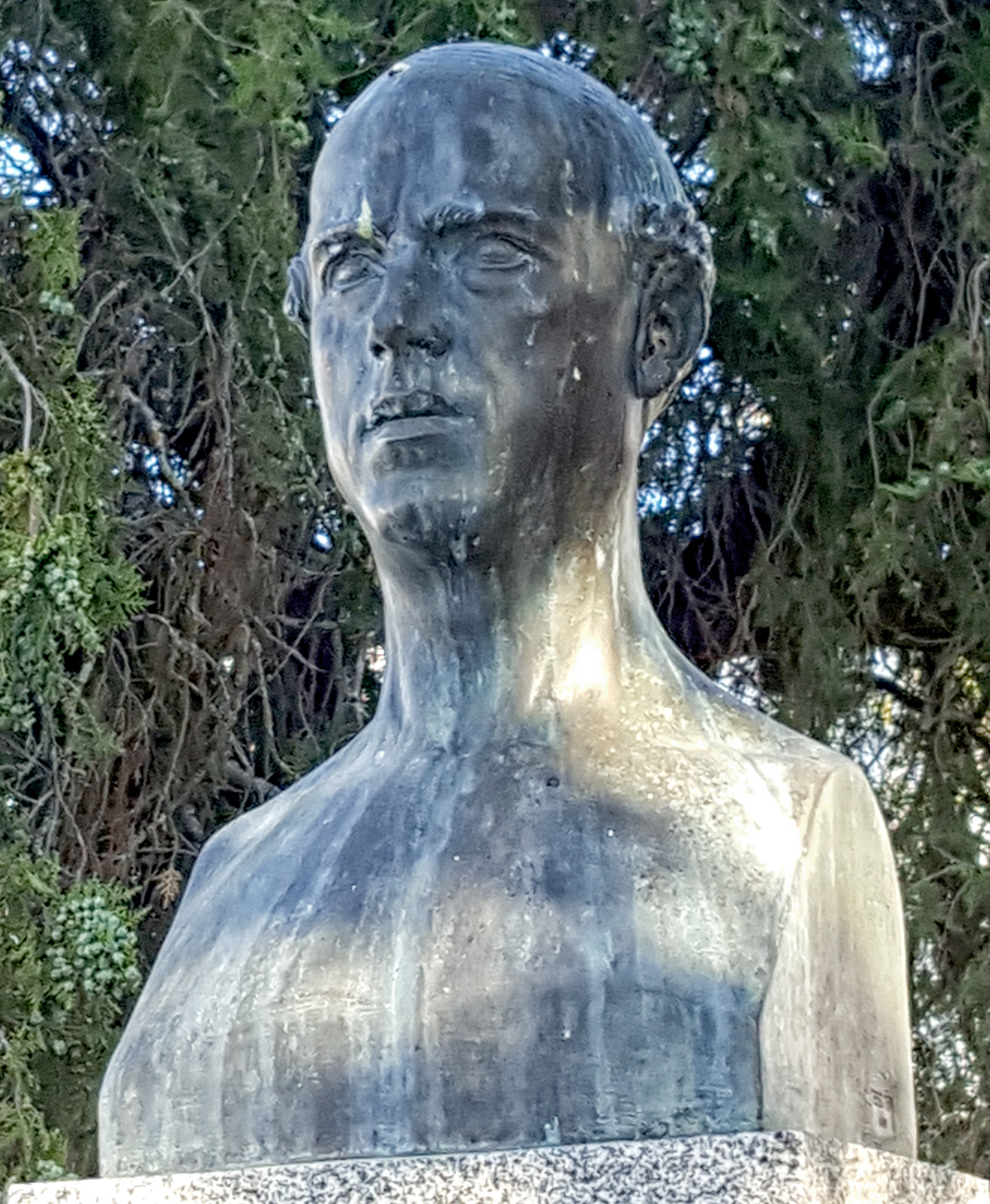 Vista tres cuartos dcha. del autorretrato de bronce del pintor español Eugenio Hermoso (c. 1930) que corona la tumba del artista situada en el cementerio municipal de Fregenal de la Sierra (Badajoz).